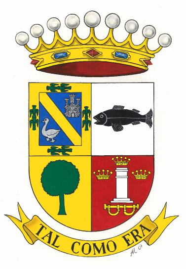 Se trata del escudo del Tercer Conde de Sánchez-Ocaña, título de la Corona Española